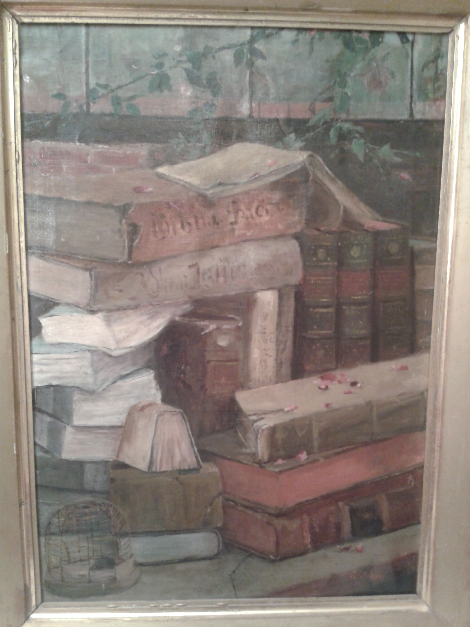 Pintura sobre lienzo realizada por Vicente Riva Palacio.